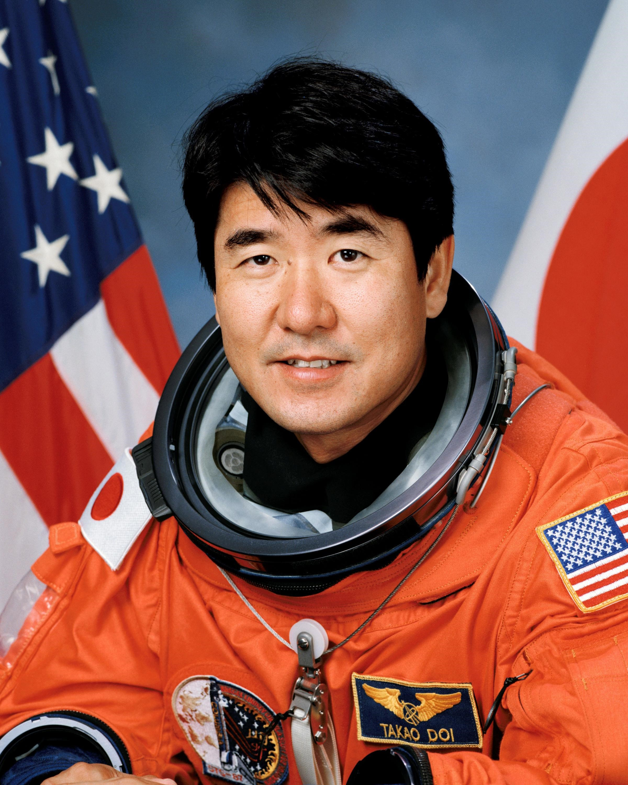 astronaut Takao Doi.